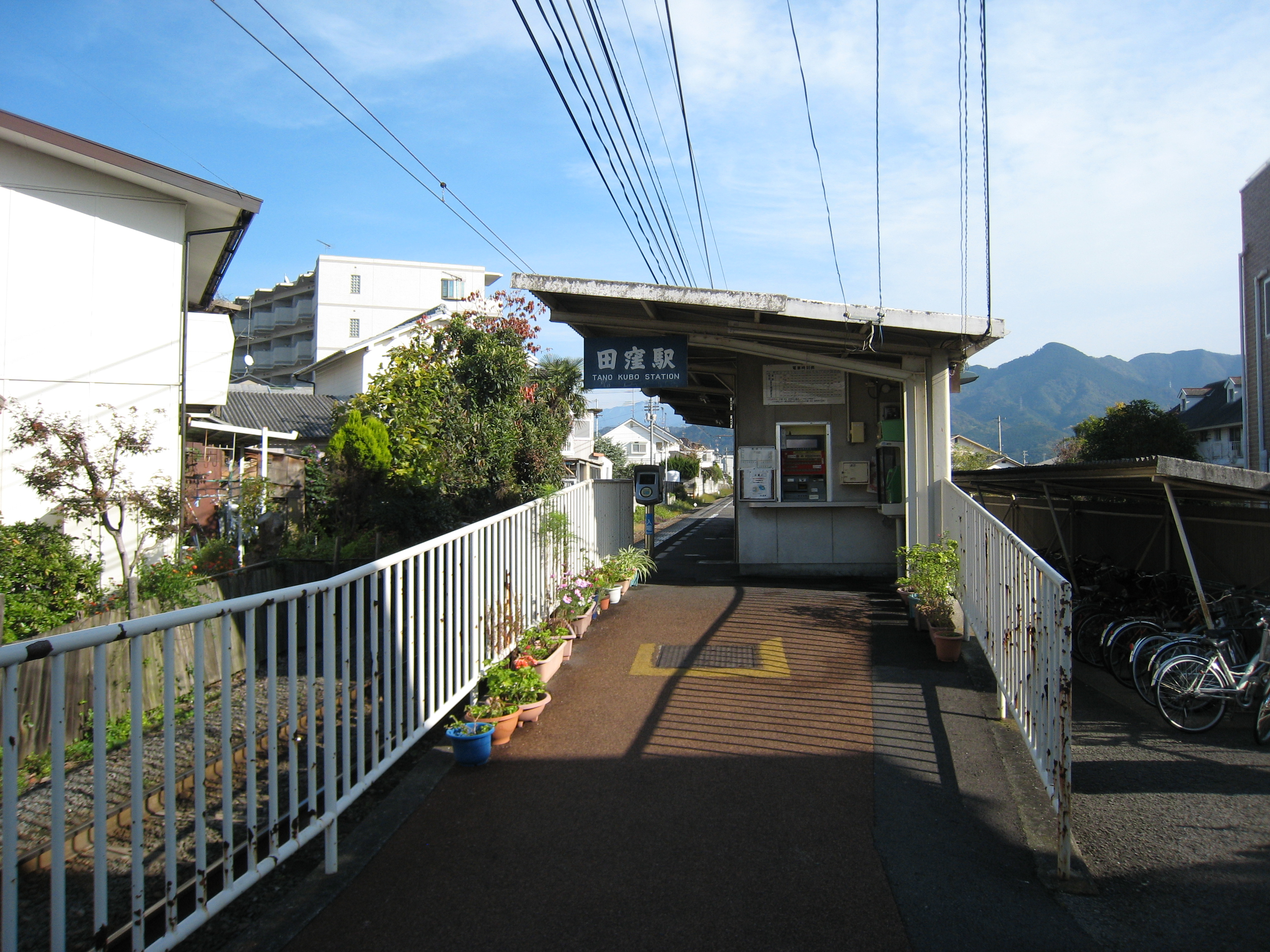 伊予鉄道 田窪駅